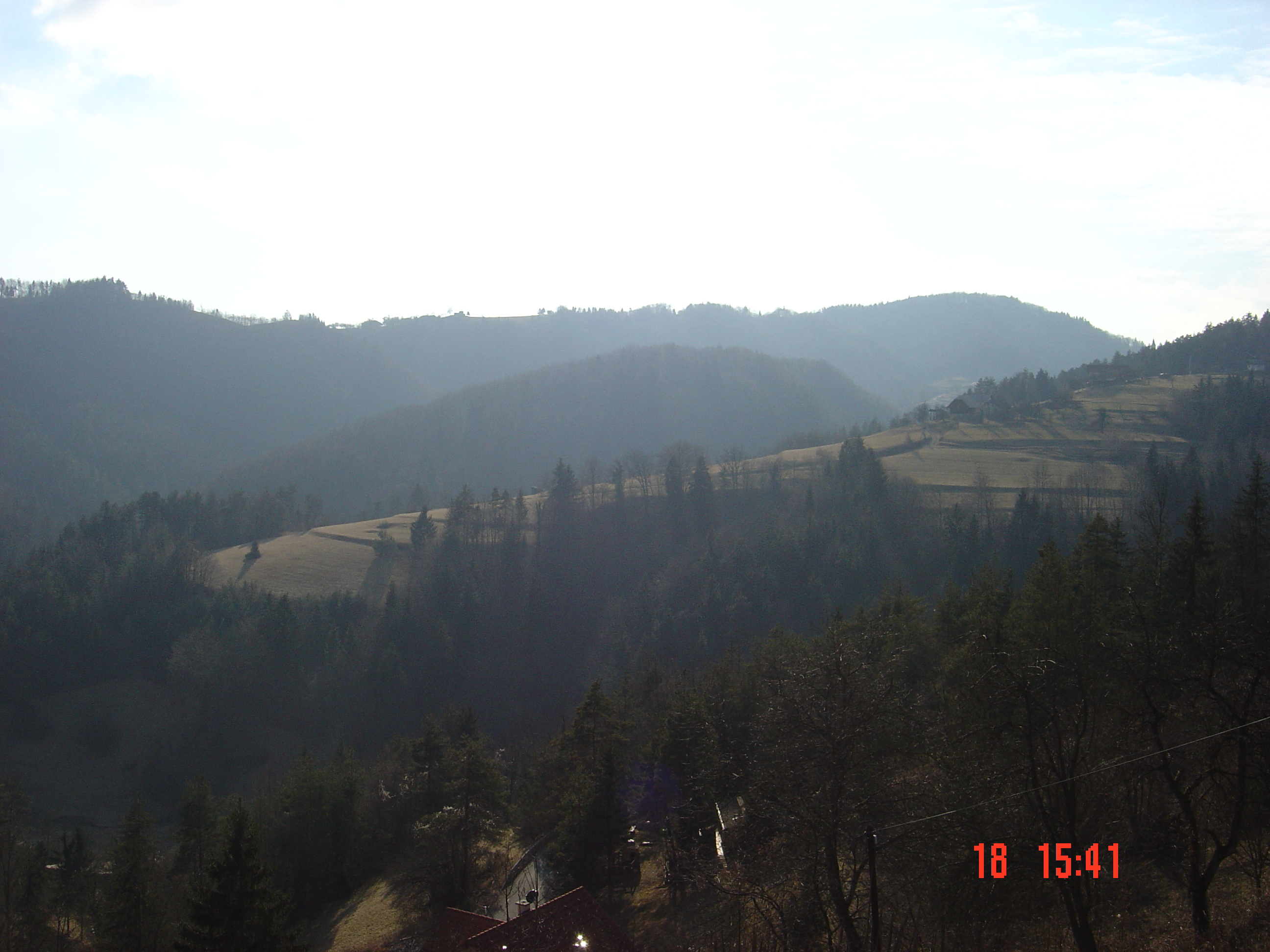 Območje izvira Temenice - Javorje, 2004